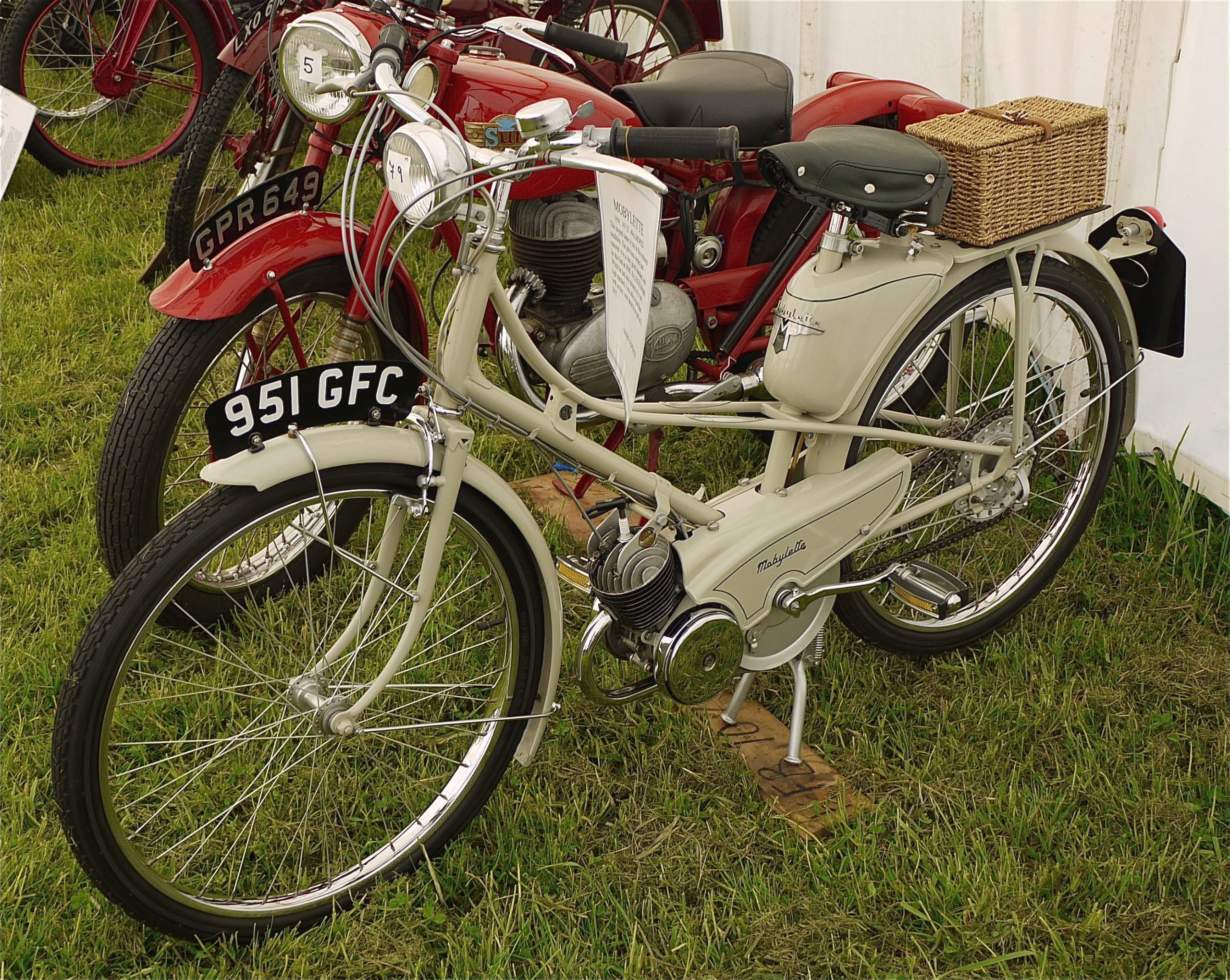 Panasonic G1 14-45 Lens